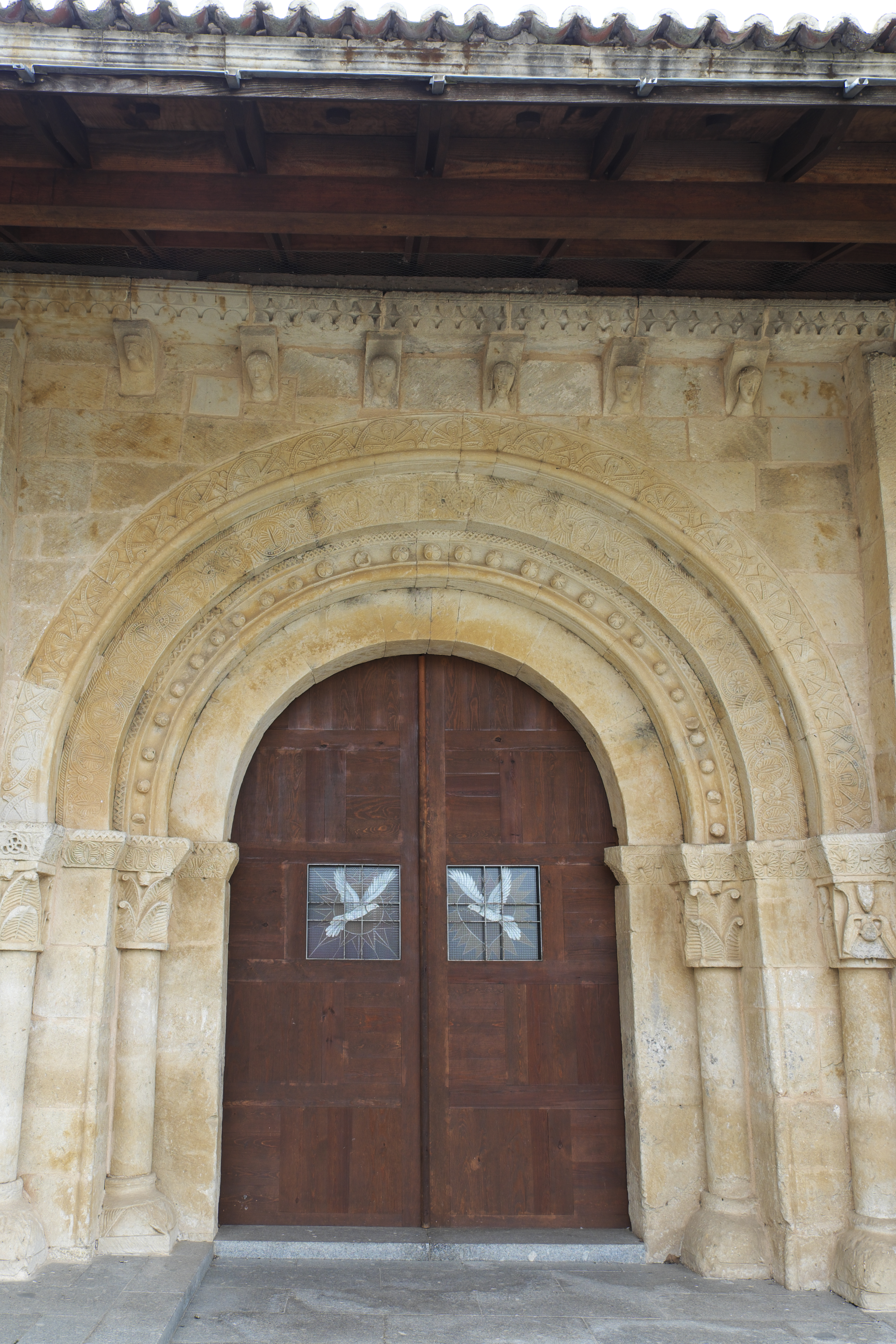 Kirche Santa María in Almenara de Tormes in der Provinz Salamanca Provinz Salamanca (Kastilien-León/Spanien), aus dem 12. Jahrhundert, romanisches Stufenportal/Nordportal